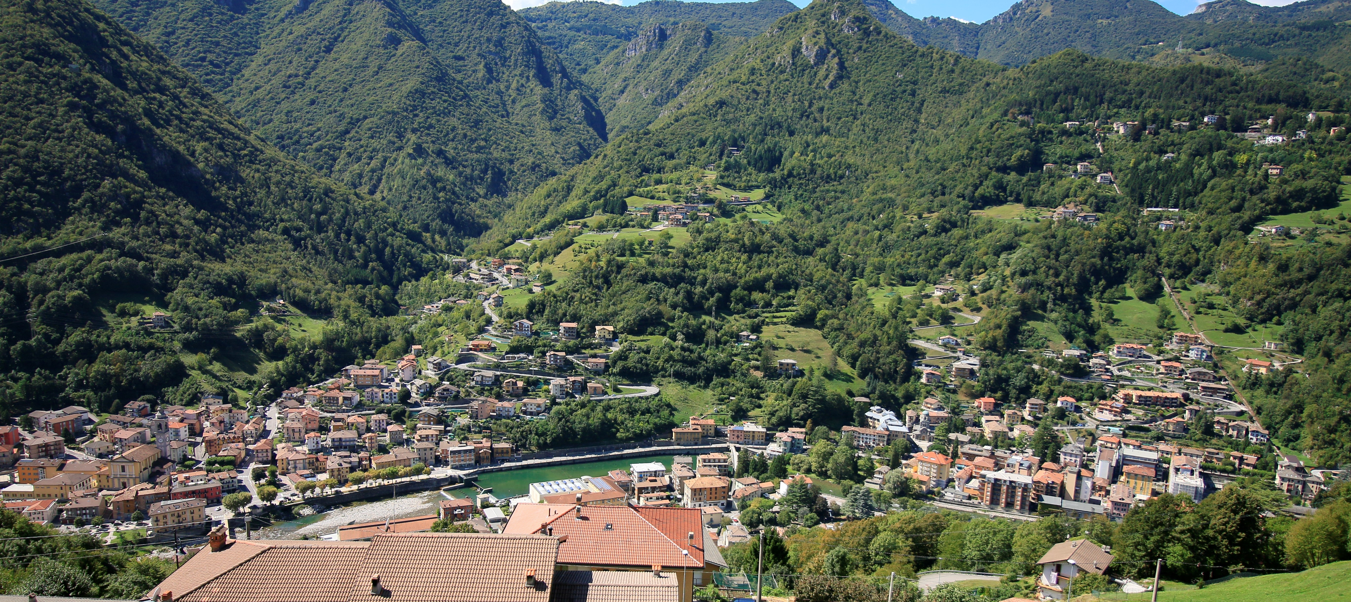 Vista, dalla località Frasnadello, del comune di San Pellegrino Terme (BG)